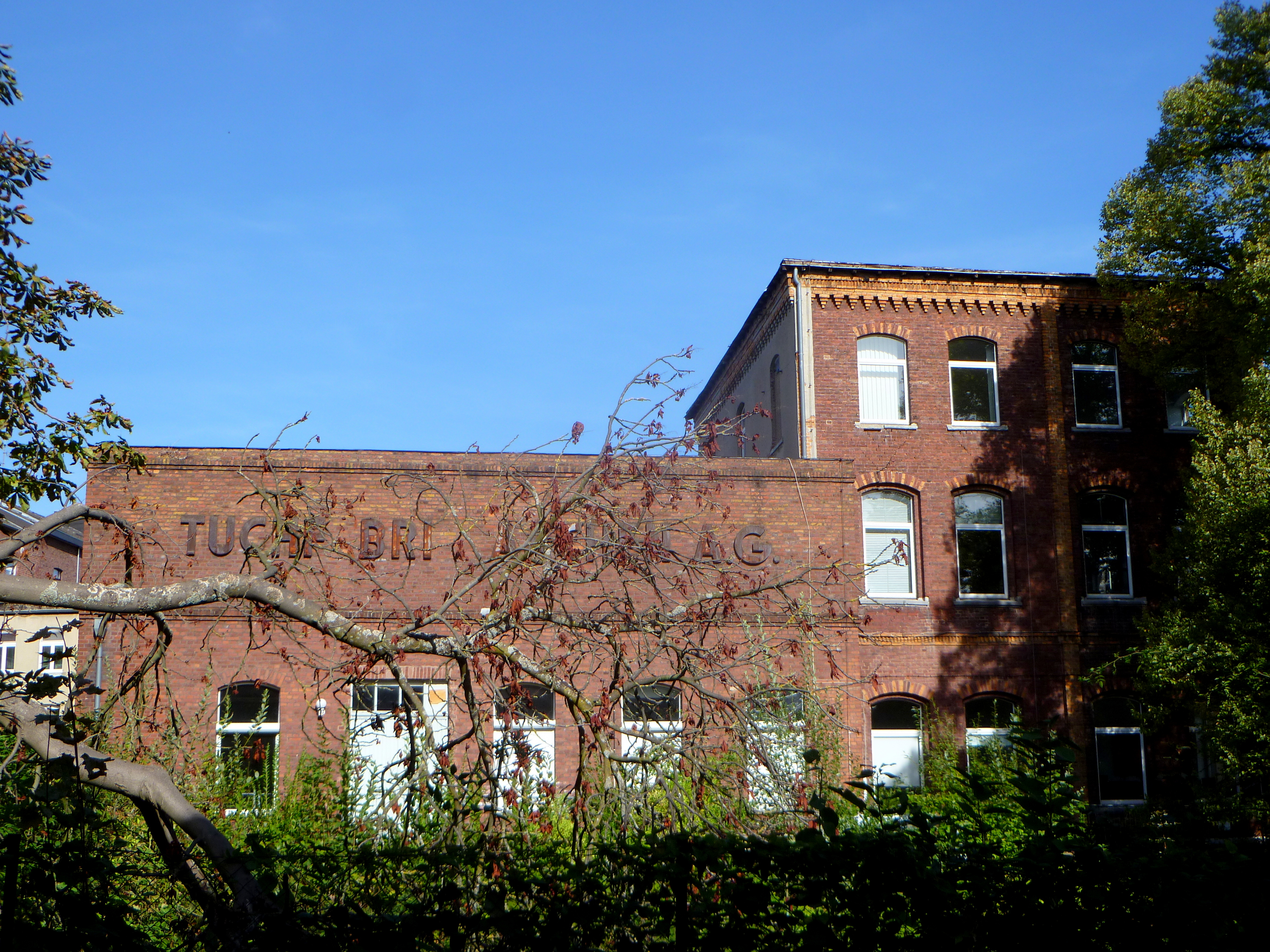 ehem. Tuchfabrik Aachen AG in der Charlottenstraße in Aachen